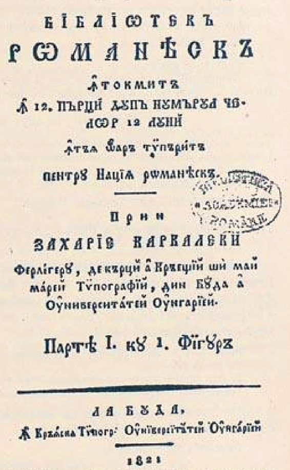 Titlu din Revista "Biblioteca românească" întocmită de Zaharia Carcalechi, Buda 1821